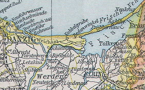 Kreis Danziger Niederung, Ausschnitt aus File:Ost-_und_Westpreussen.jpg